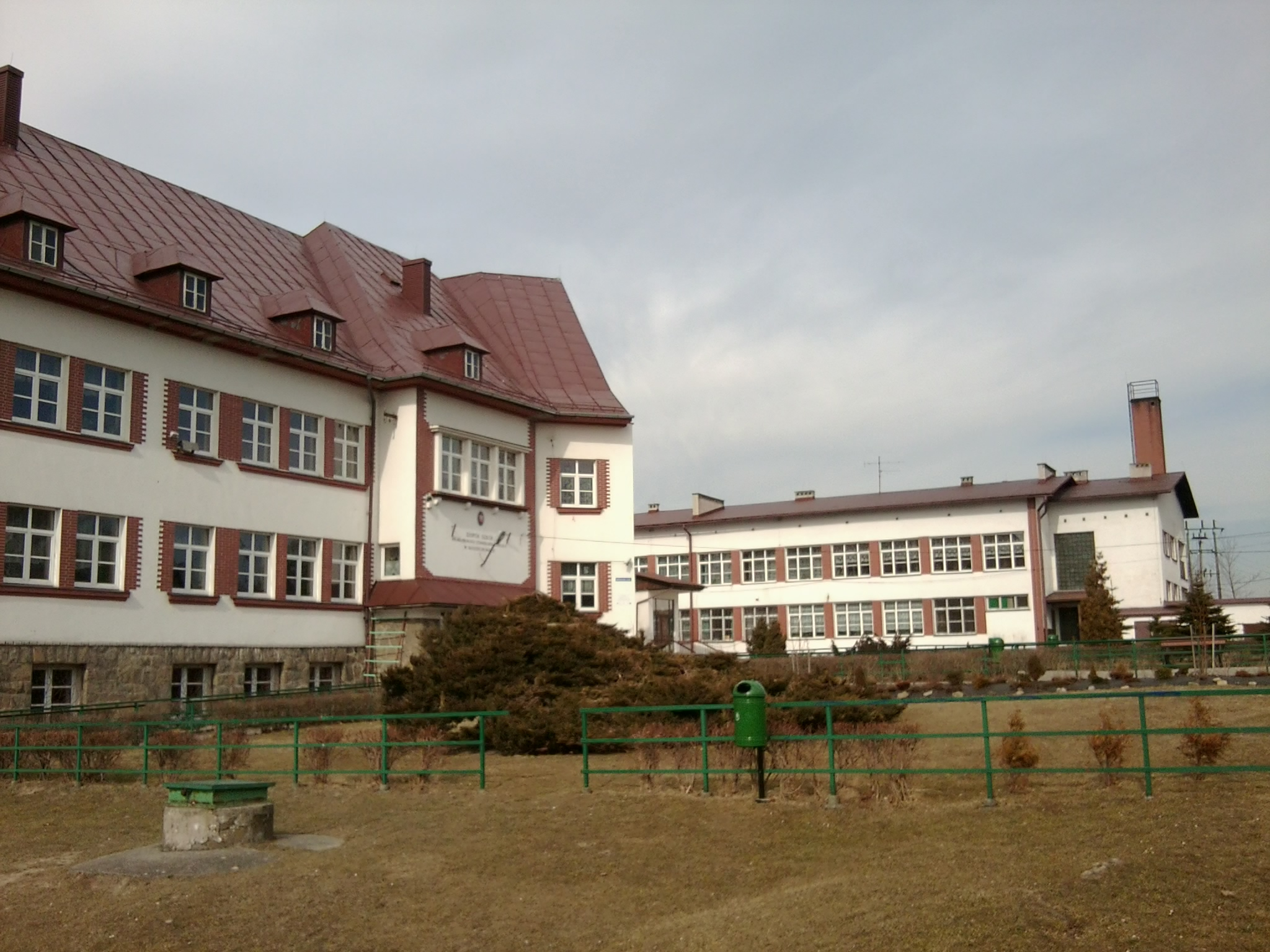 Zespół Szkół im. ks.prałata Stanisława Gawlika w Radziechowach